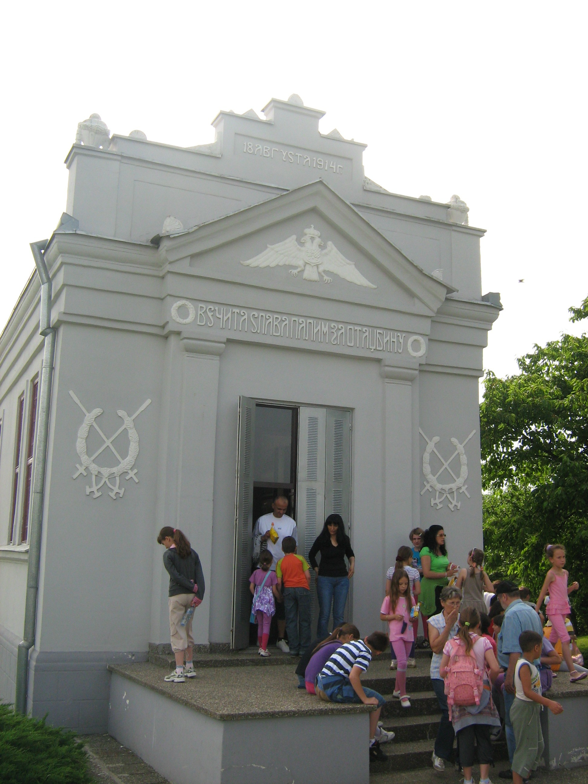 музеј Церске битке - споља